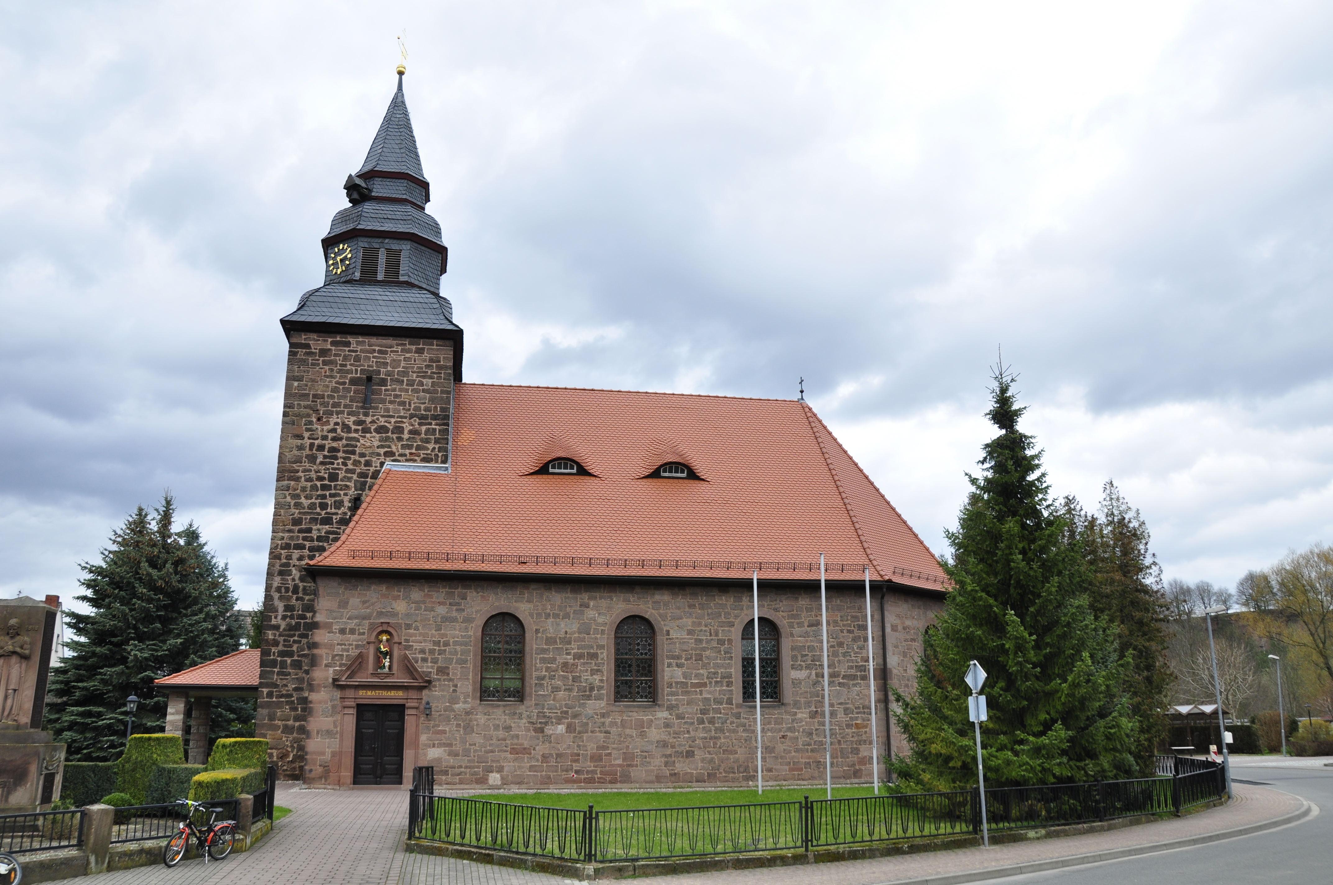 St. Matthäus, Arenshausen, Thüringen